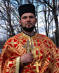 Preot ortodox răsăritean, cu potcap si felon